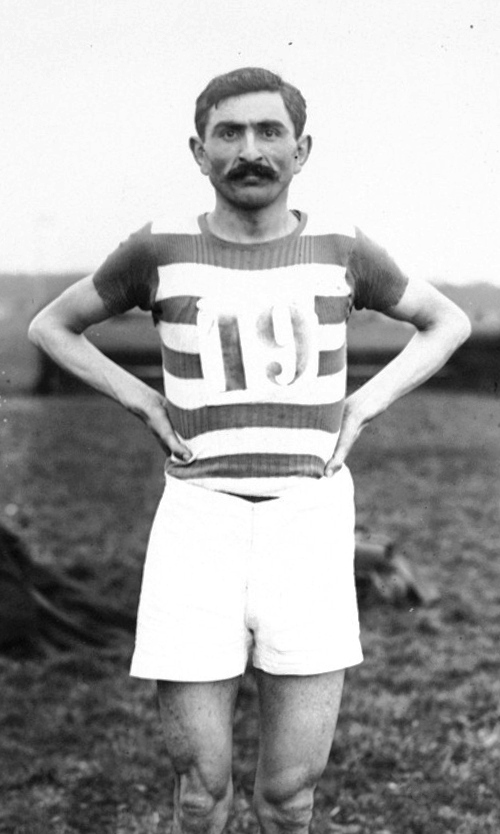 Lizandier, 2e [du] champ[ionnat] de Paris, 18-2-12 [cross] : [photographie de presse] / [Agence Rol]